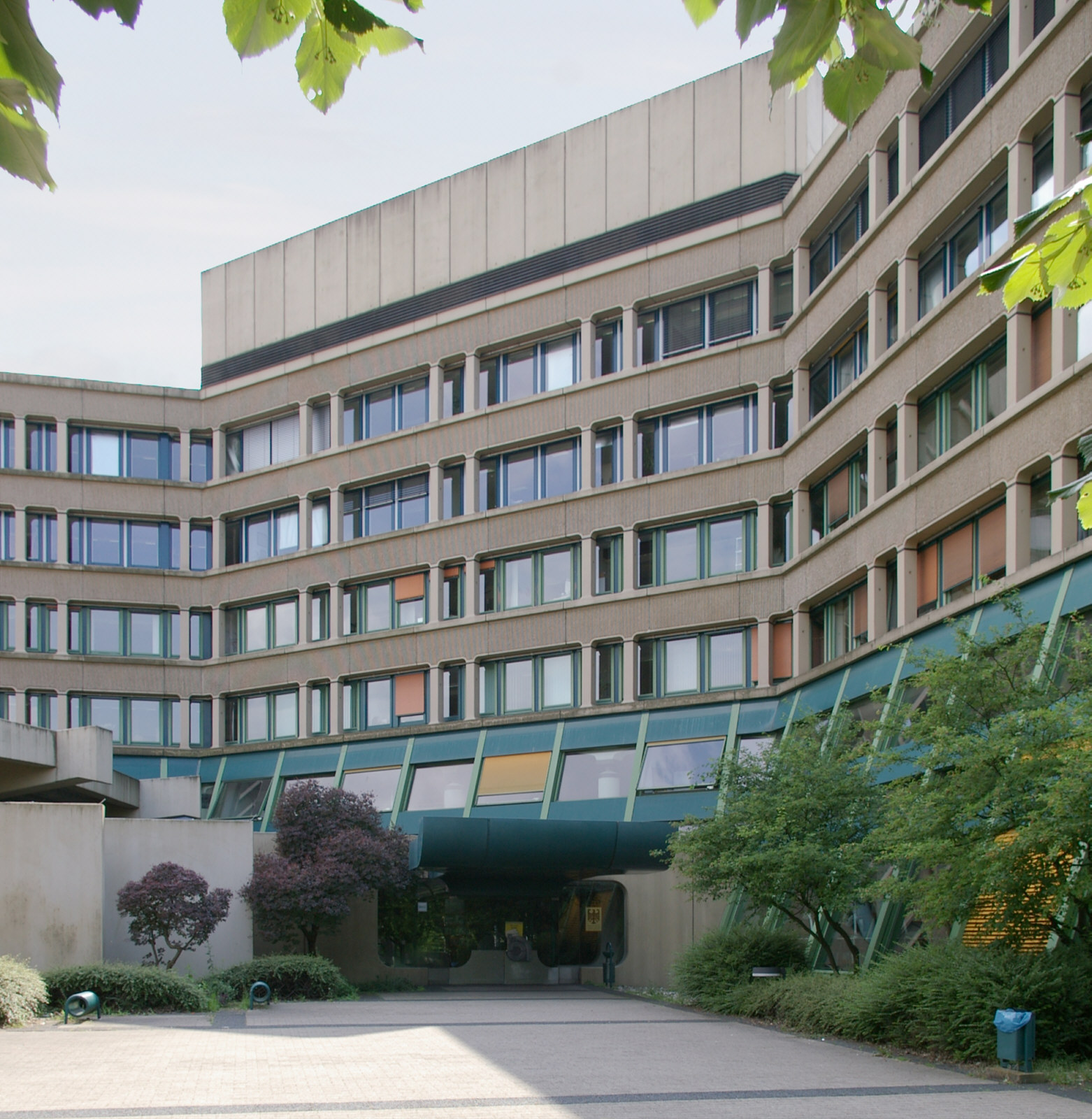 Bundesanstalt für Arbeitsschutz und Arbeitsmedizin (BAuA) in Dortmund, Nordrhein-Westfalen. Eingangsbereich.